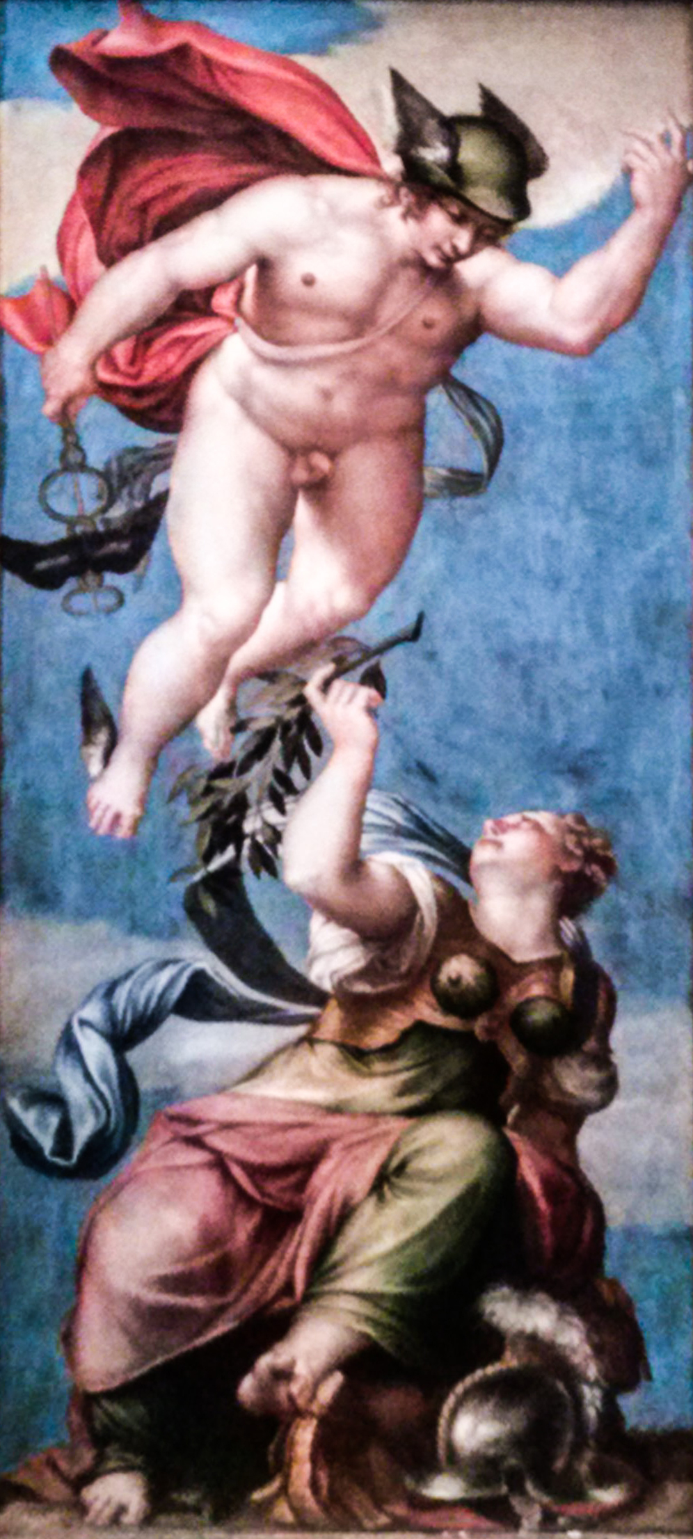 Mercurio y Minerva, pintura del techo de la Sala del Consejo de los Diez en el Palacio Ducal de Venecia.